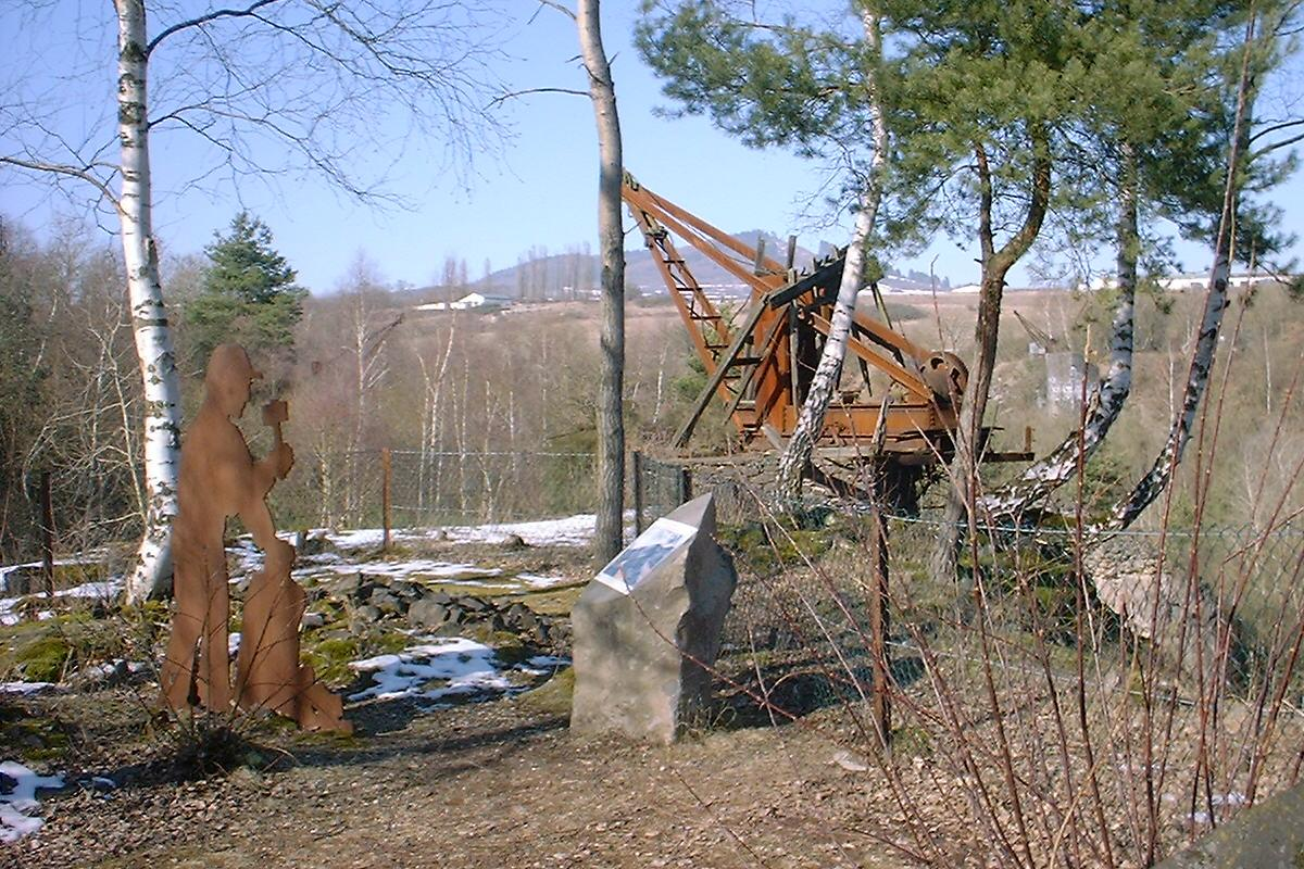 Kräne an der Ettringer Lay